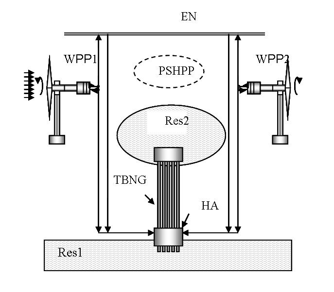 Вітротубінна гідроакумулювальна електростанція на основі існуючої ГАЕС.